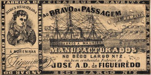 Rótulo de cigarro. Ao Bravo da Passagem de Humaitá, Cigarros a Maurity.